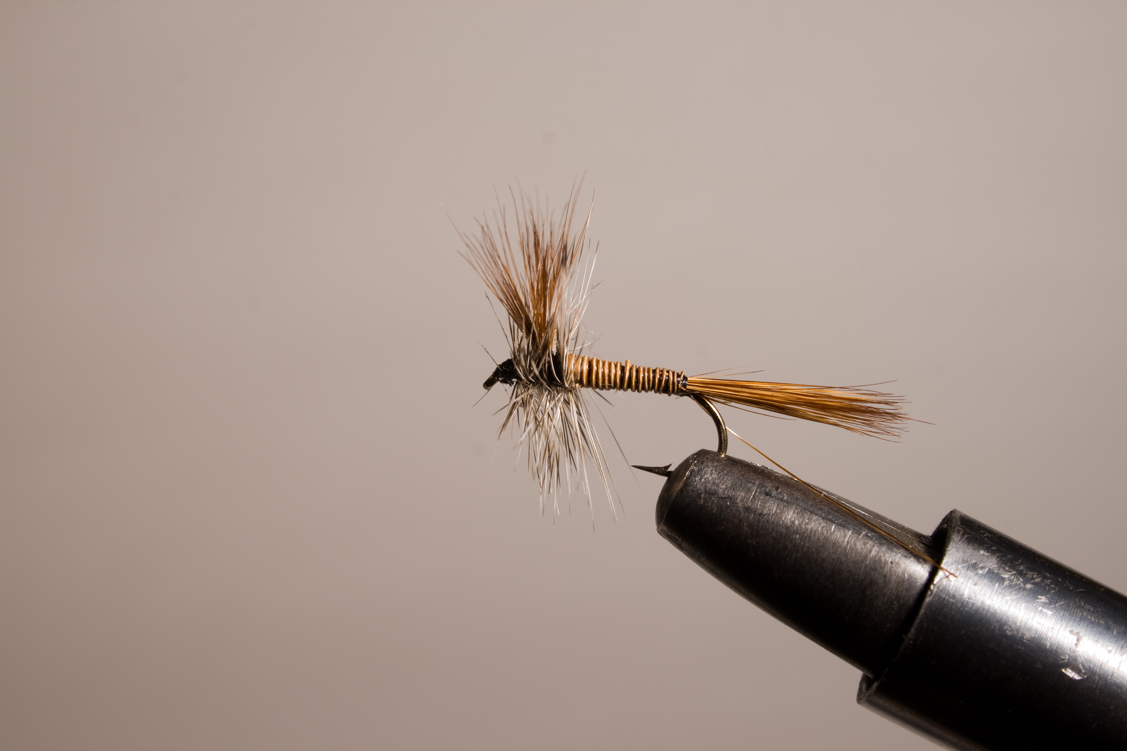 Mosca Seca Adams numero 12